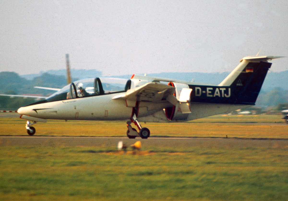 D-EATJ